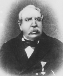 Karl Adolf Wagner